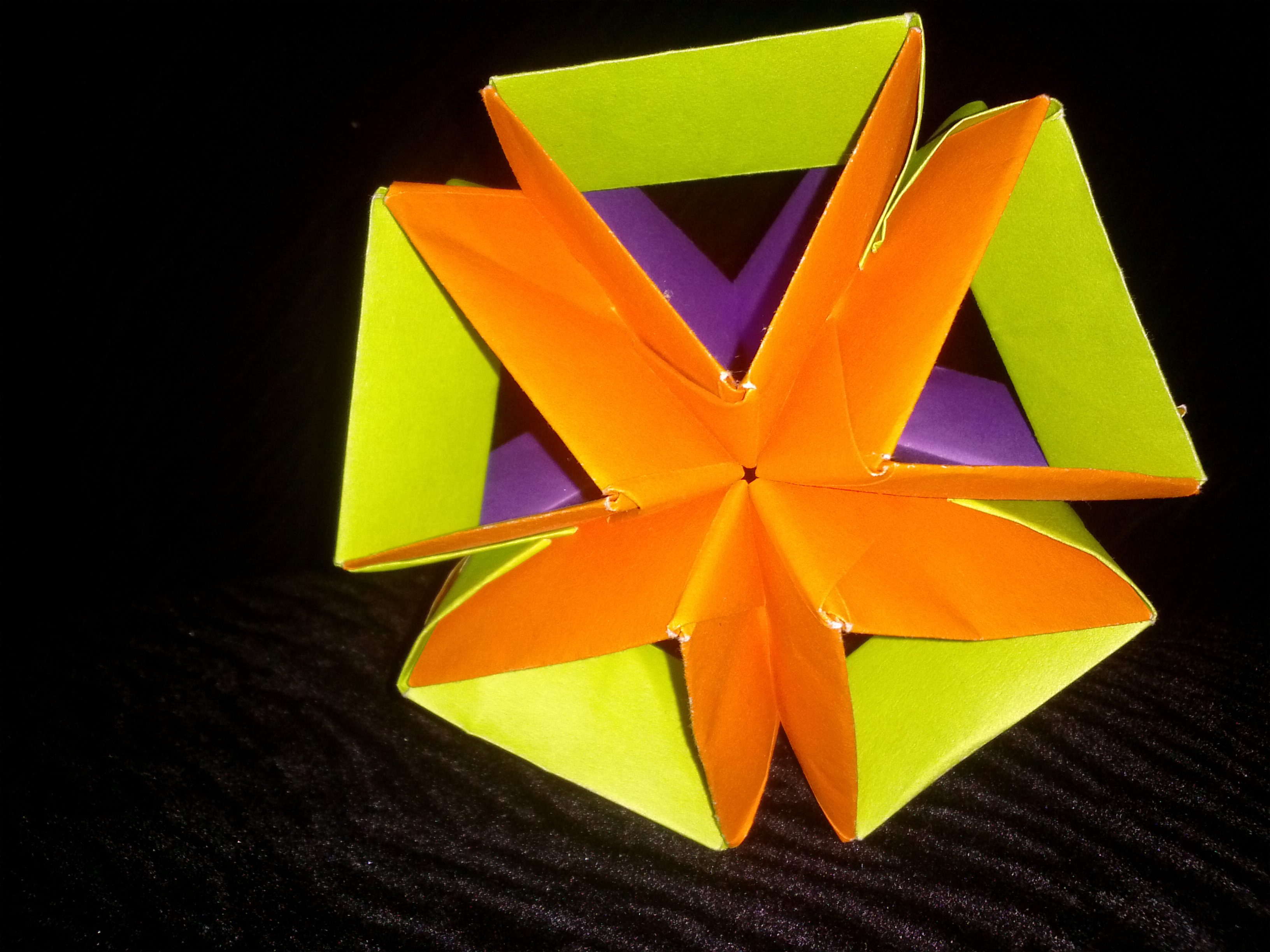 Origami 3D